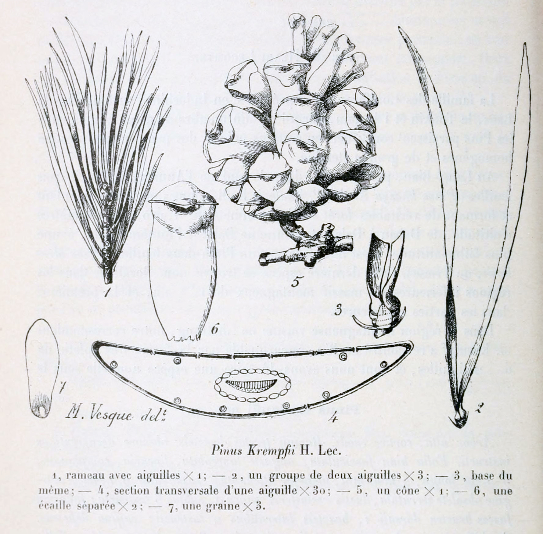 Сосна Pinus krempfii